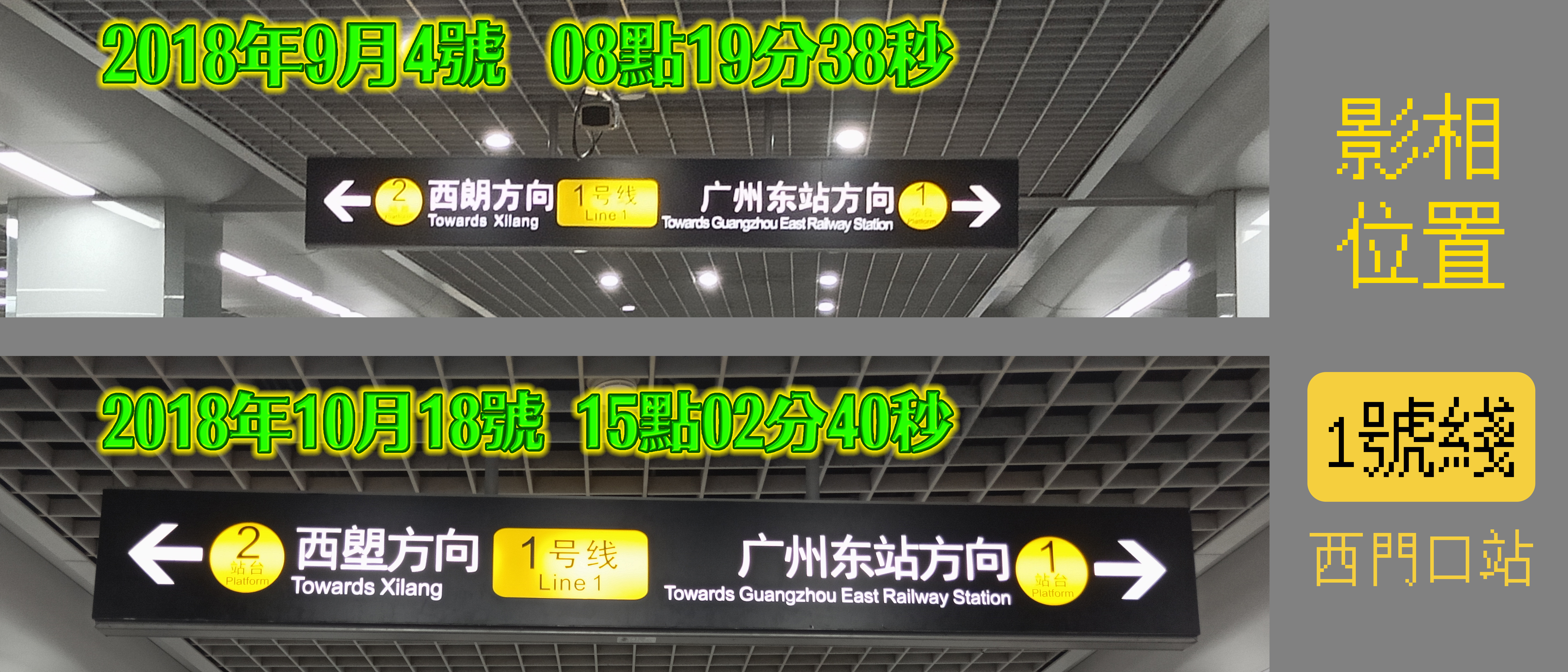 粵語: 2018年9月4號同2018年10月18號嗰兩日之間，廣州地鐵1號綫西門口站近住1號月台6號幕門同2號月台24號幕門之間，掛喺天花板嘅導航燈箱嘅站名變化過程。入面明顯發現「西朗」兩字變咗「西塱」。